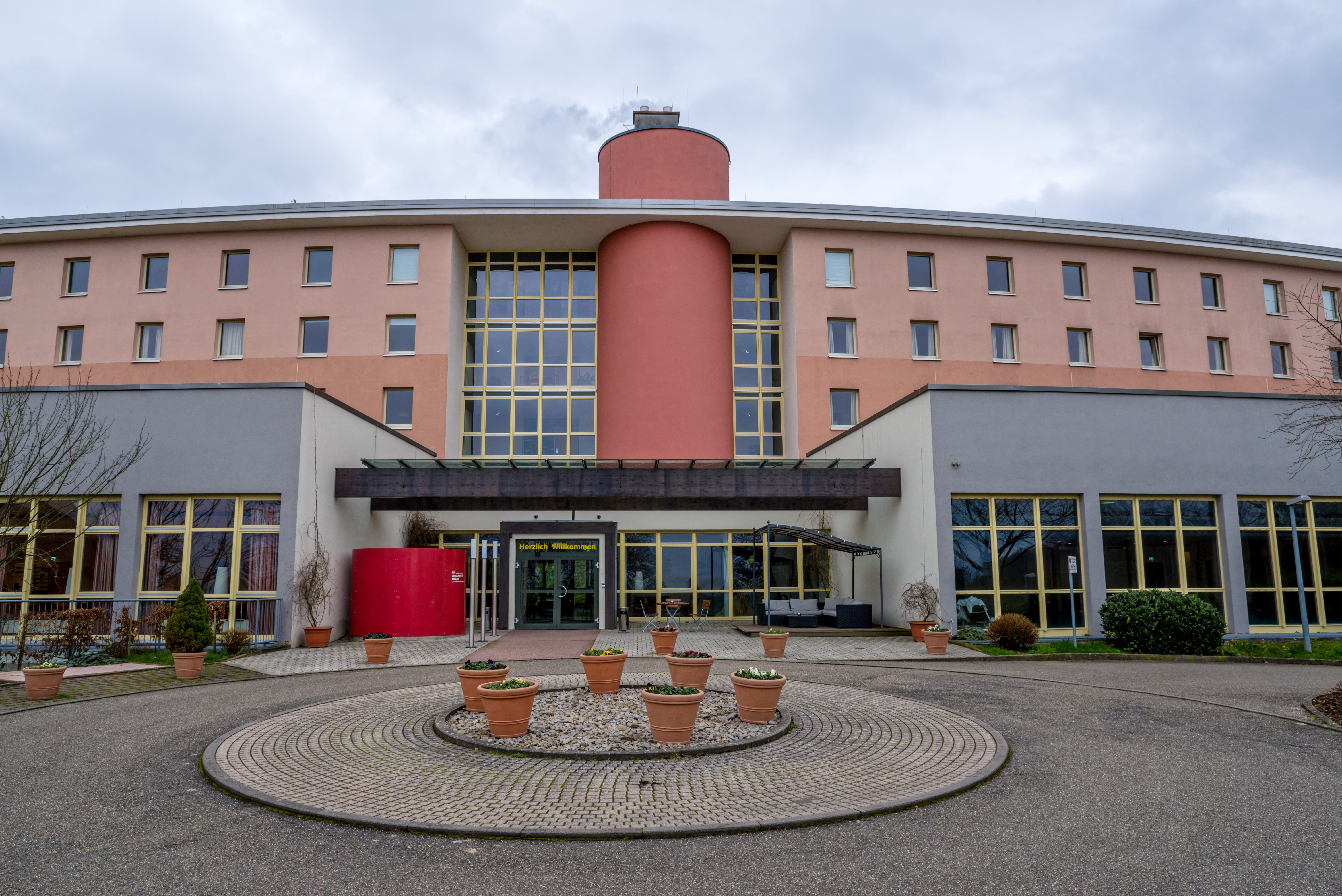 Bilder von der Tour Achern Offenburg am 10.02.2018